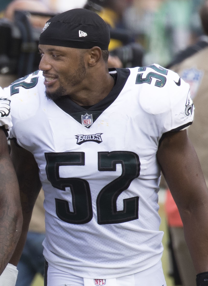 Eagles at Redskins 9/10/17